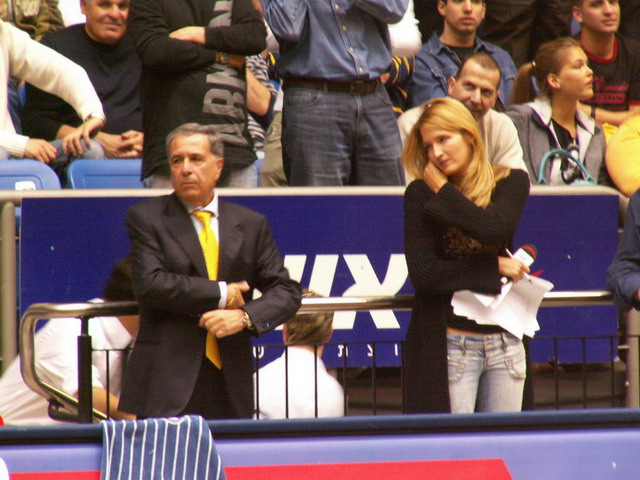 בר רפאלי צופה במשחק צולם על-ידי אבי קדמי to be photographed by Avi Kedmi